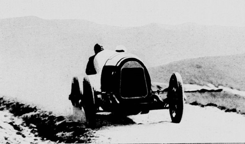 René Thomas vainqueur au Mont Ventoux sur Delage Sprint 5L. en 1922 Le Monde Illustré du 12 août 1922, p.152 - Le Monde Illustré du 12 août 1922, p.152.